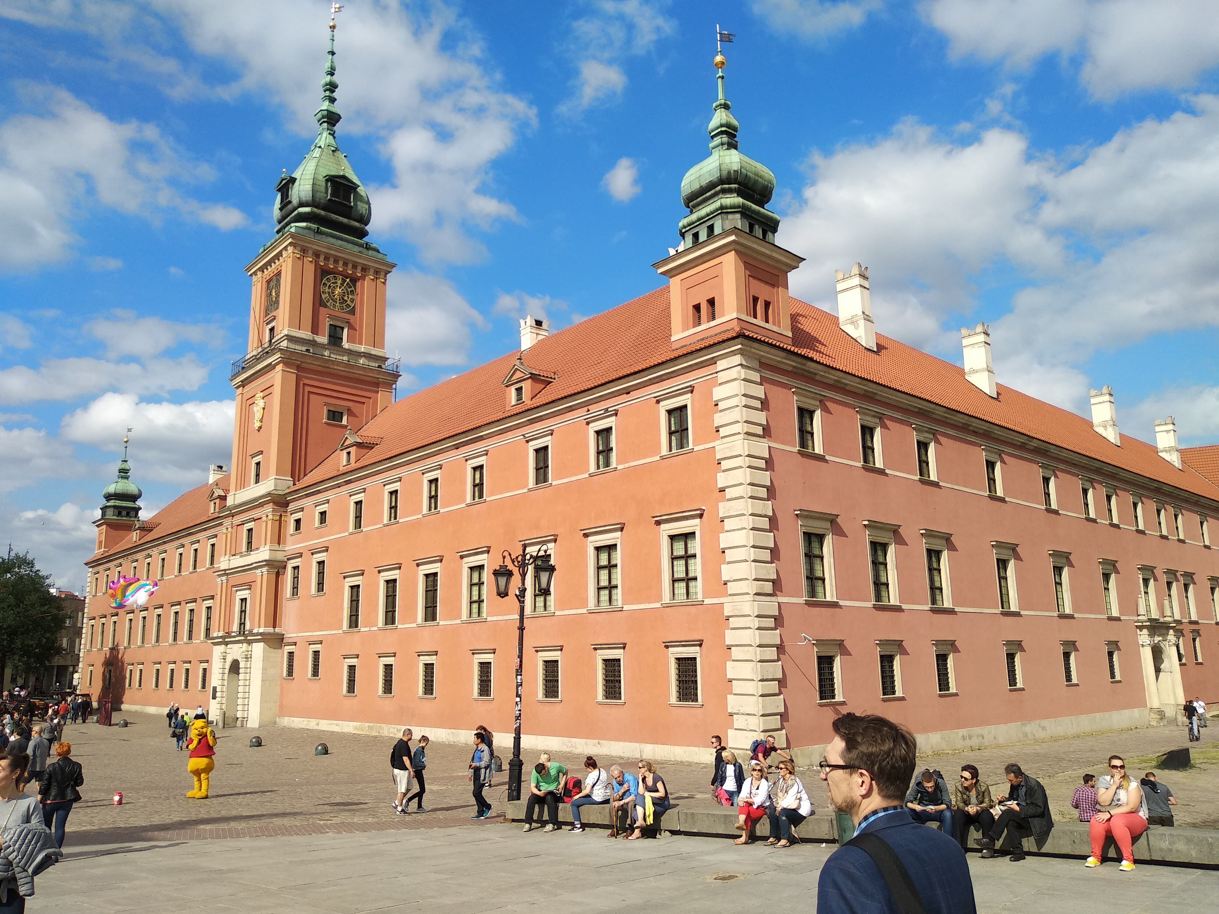 Zamek Królewski w Warszawie.